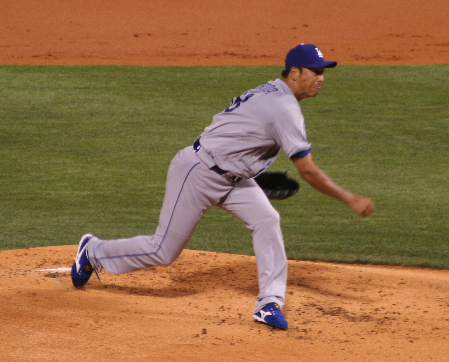 Hiroki Kuroda